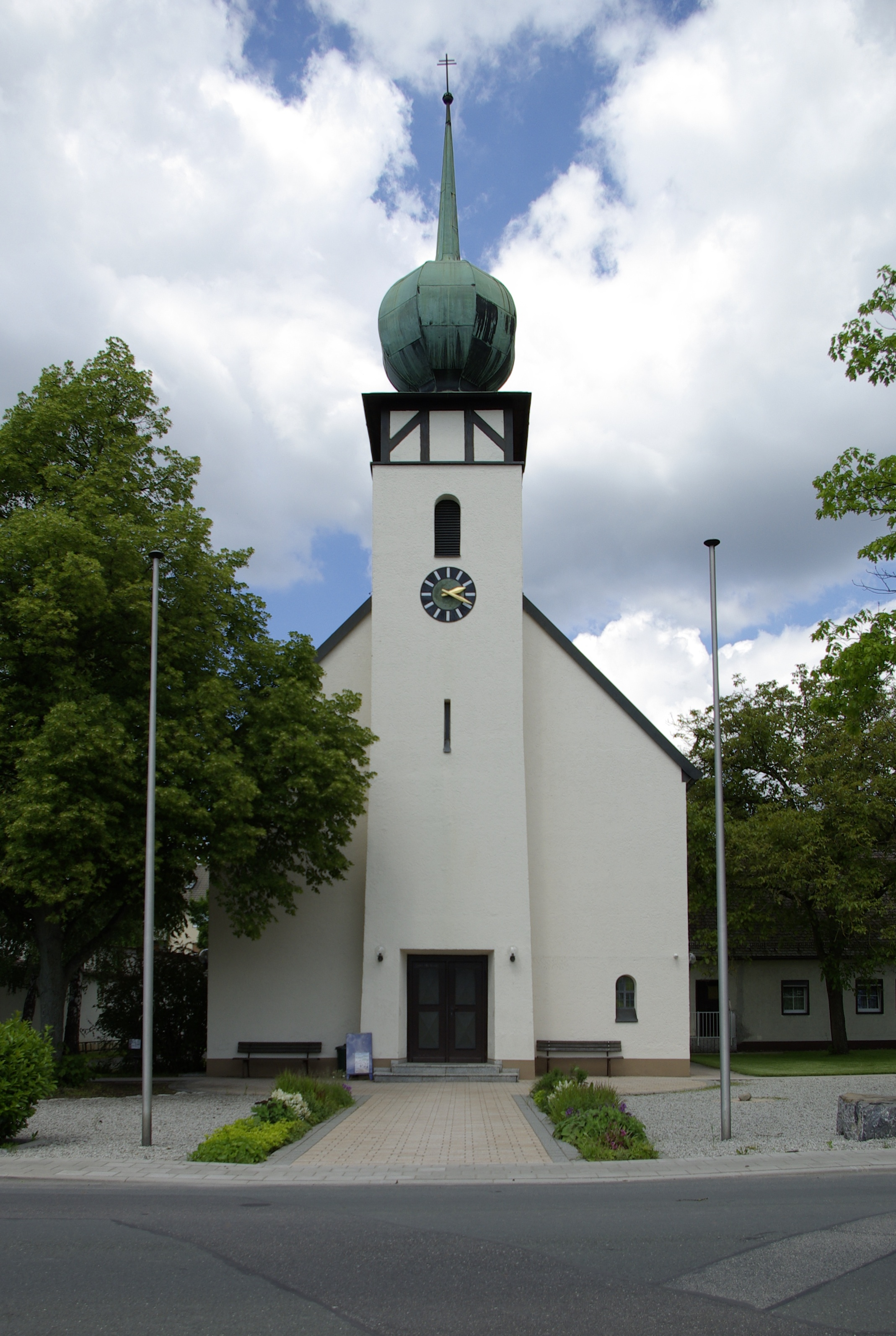 Herz-Jesu-Kirche im Fürther Stadtteil Mannhof